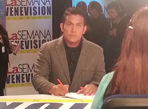 Daniel Castelllano en entrevista en Venevisión (2014)